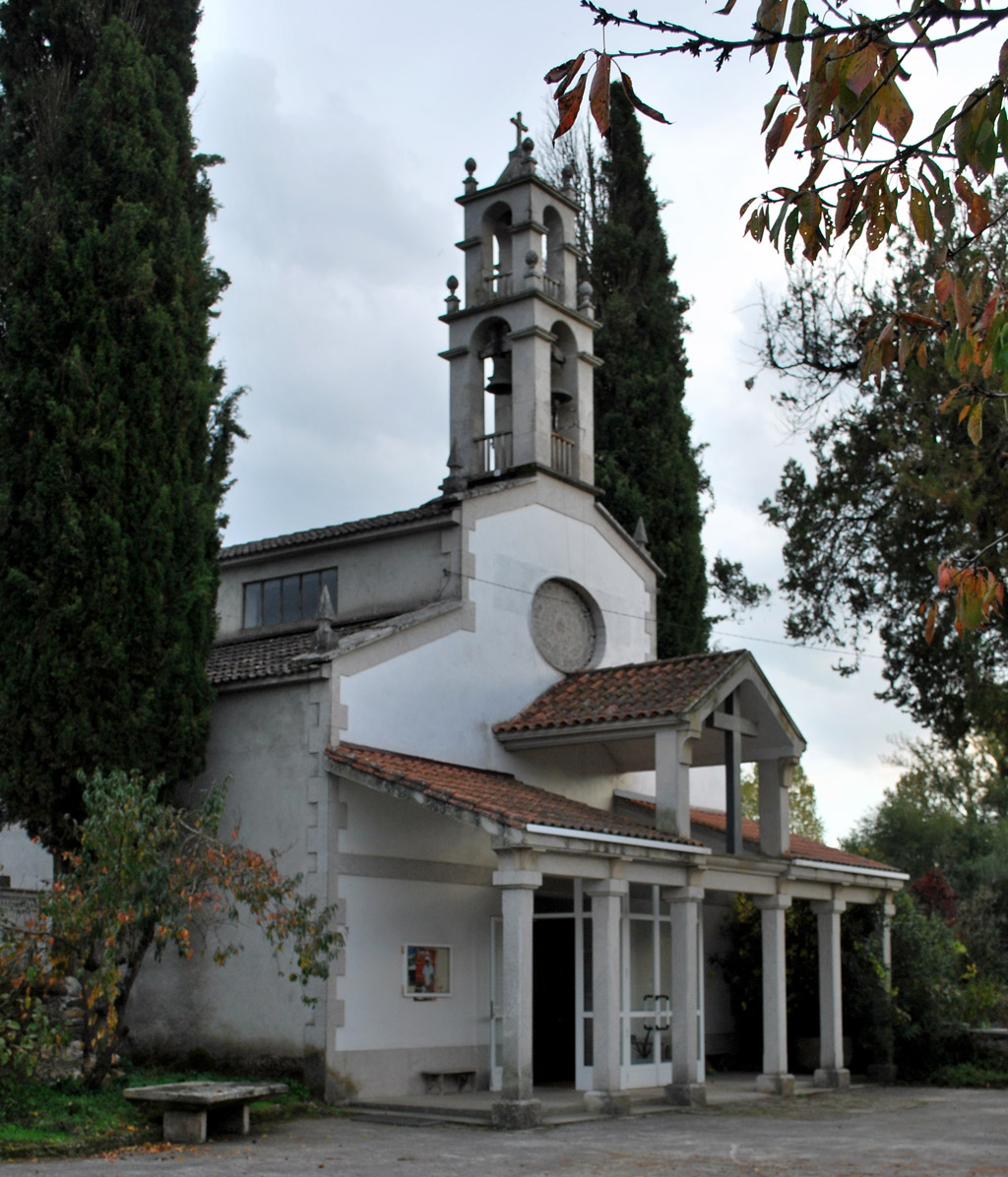 Igrexa de Distriz.